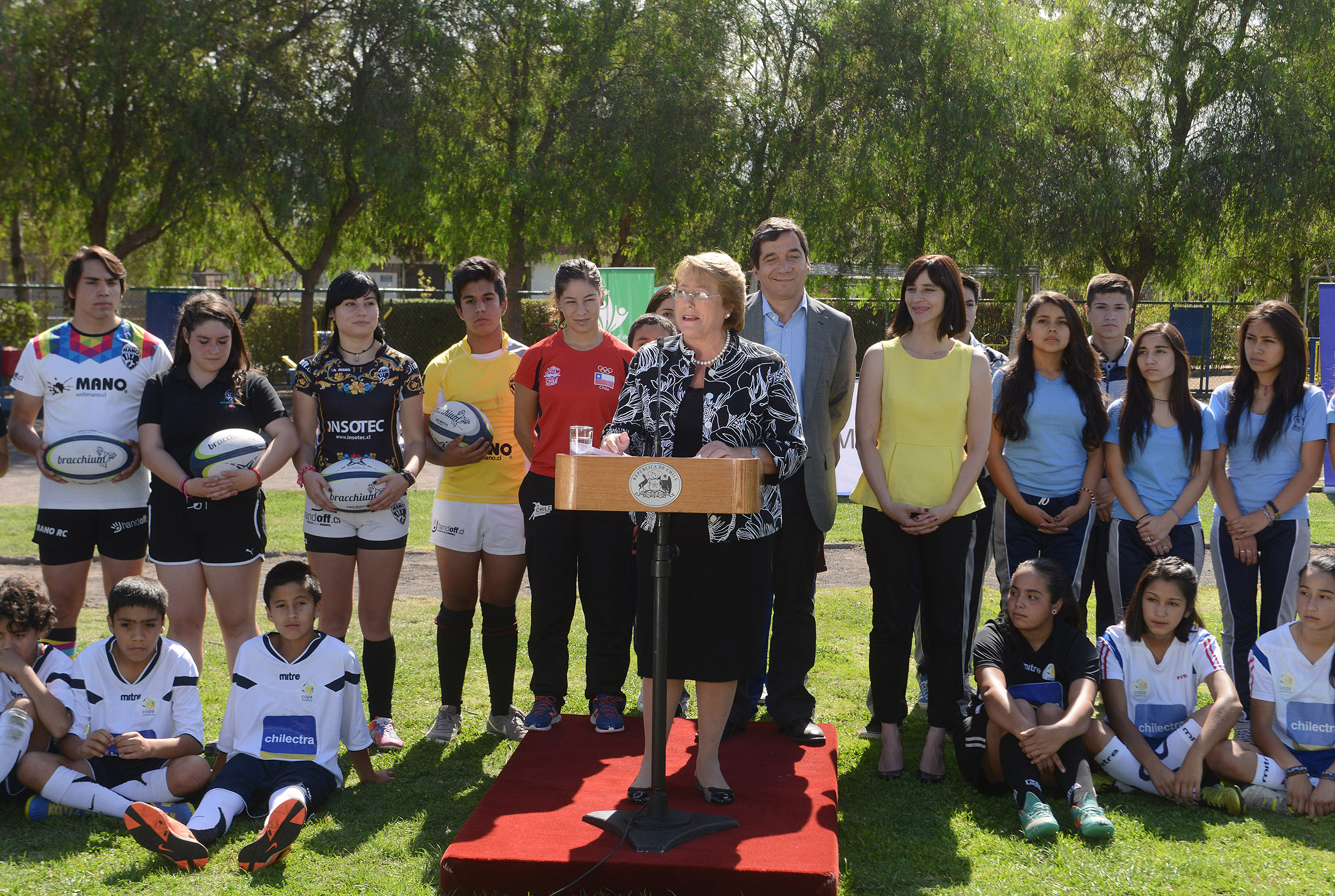 Presidenta Michelle Bachelet y Ministra del Deporte, Natalia Riffo, y el Alcalde de Independencia, Gonzalo Durán, visitaron escuelas deportivas de la comuna.